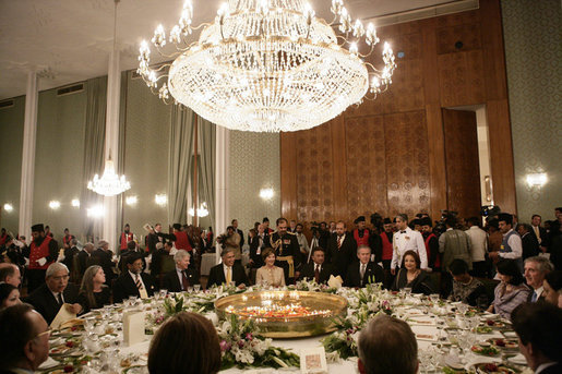 Bush in Islamabad, Pakistan